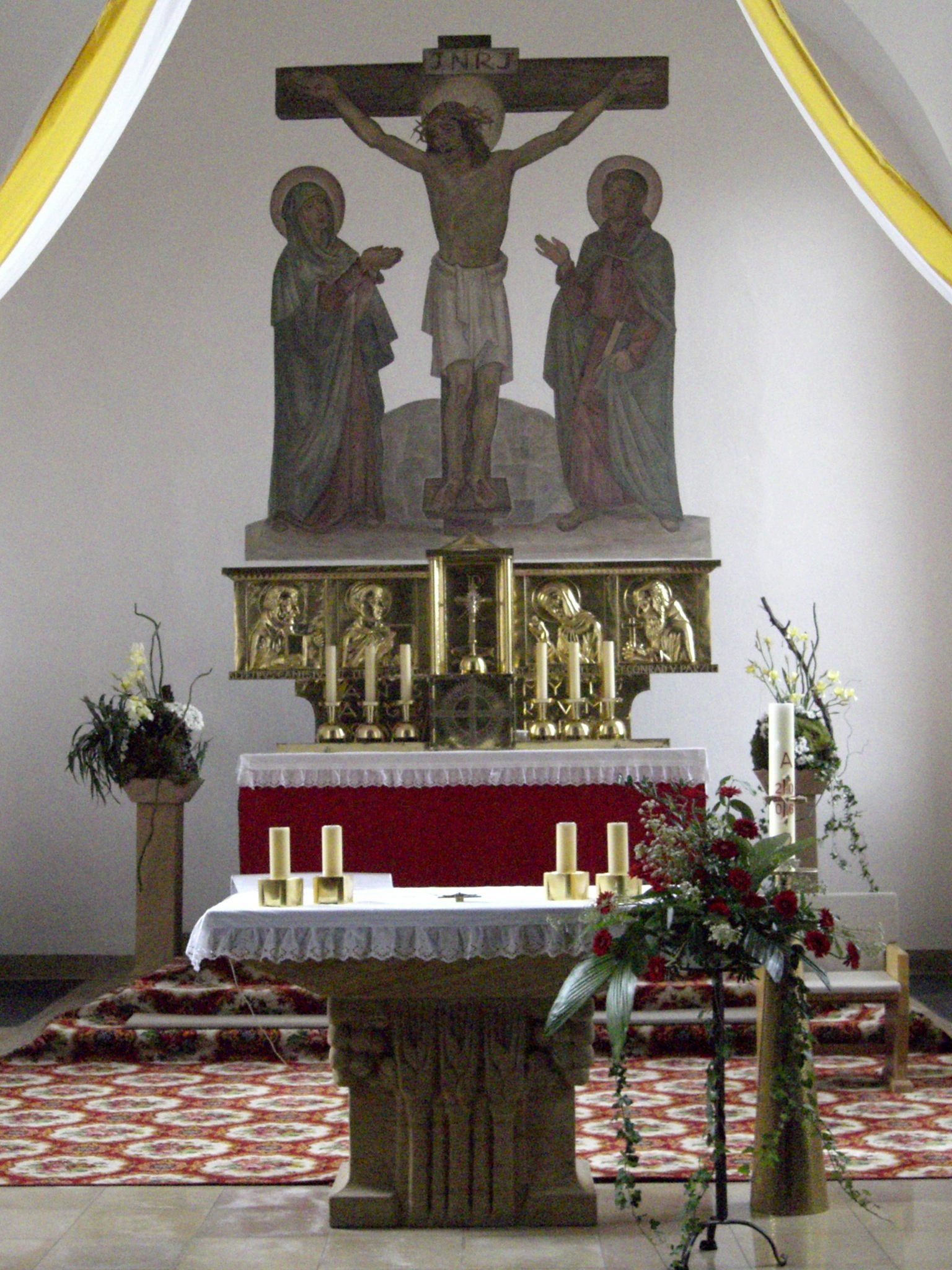 Altar der Kirche von Greßthal